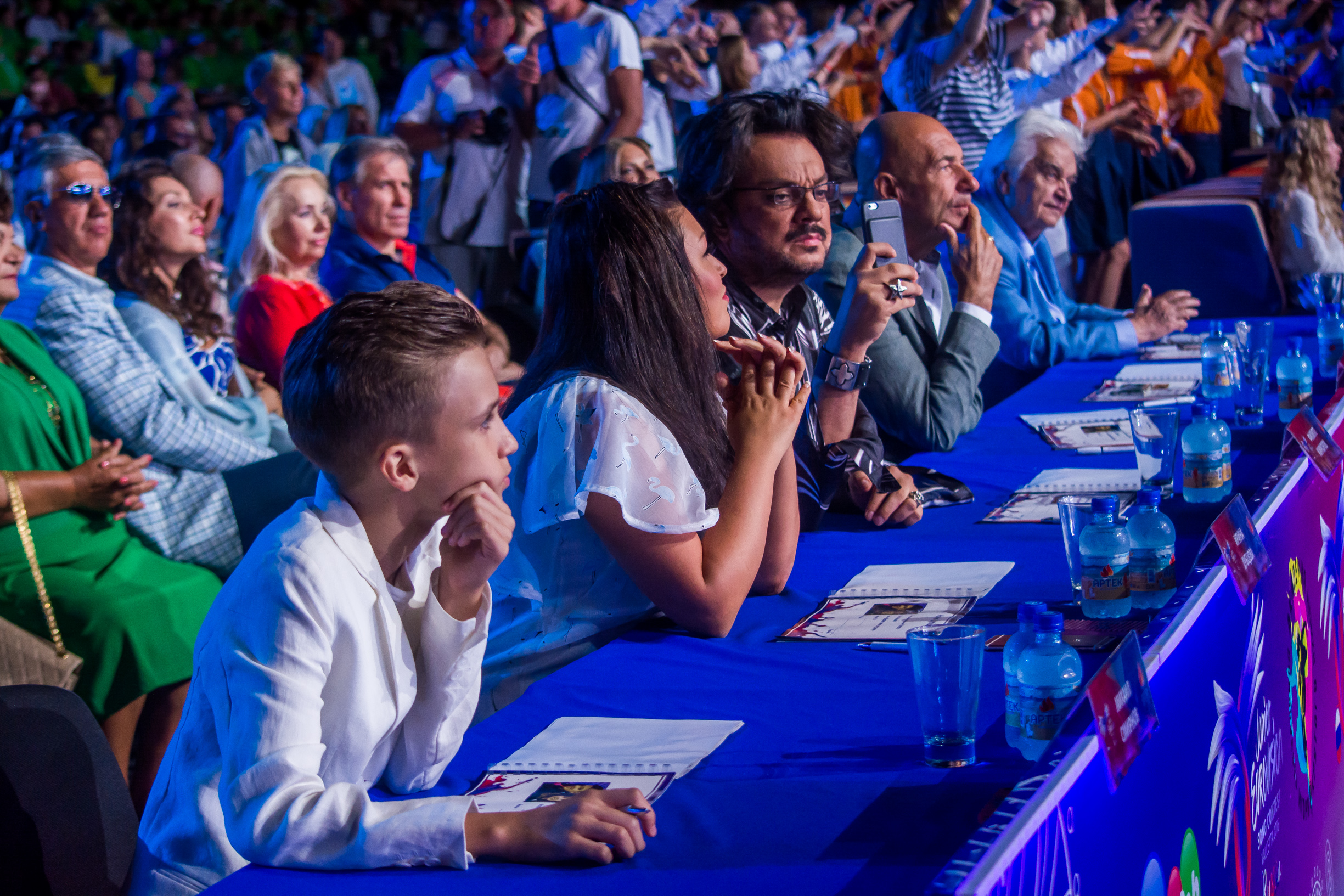 Миша Смирнов на российском отборе на Детское Евровидение 2016